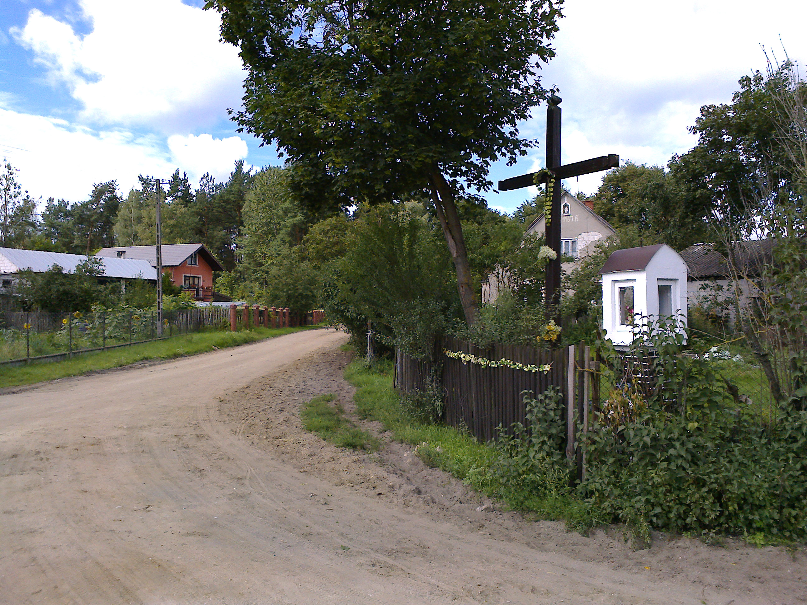 Charubin (powiat kolneński)